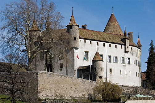 Oron-le-Châtel: Château